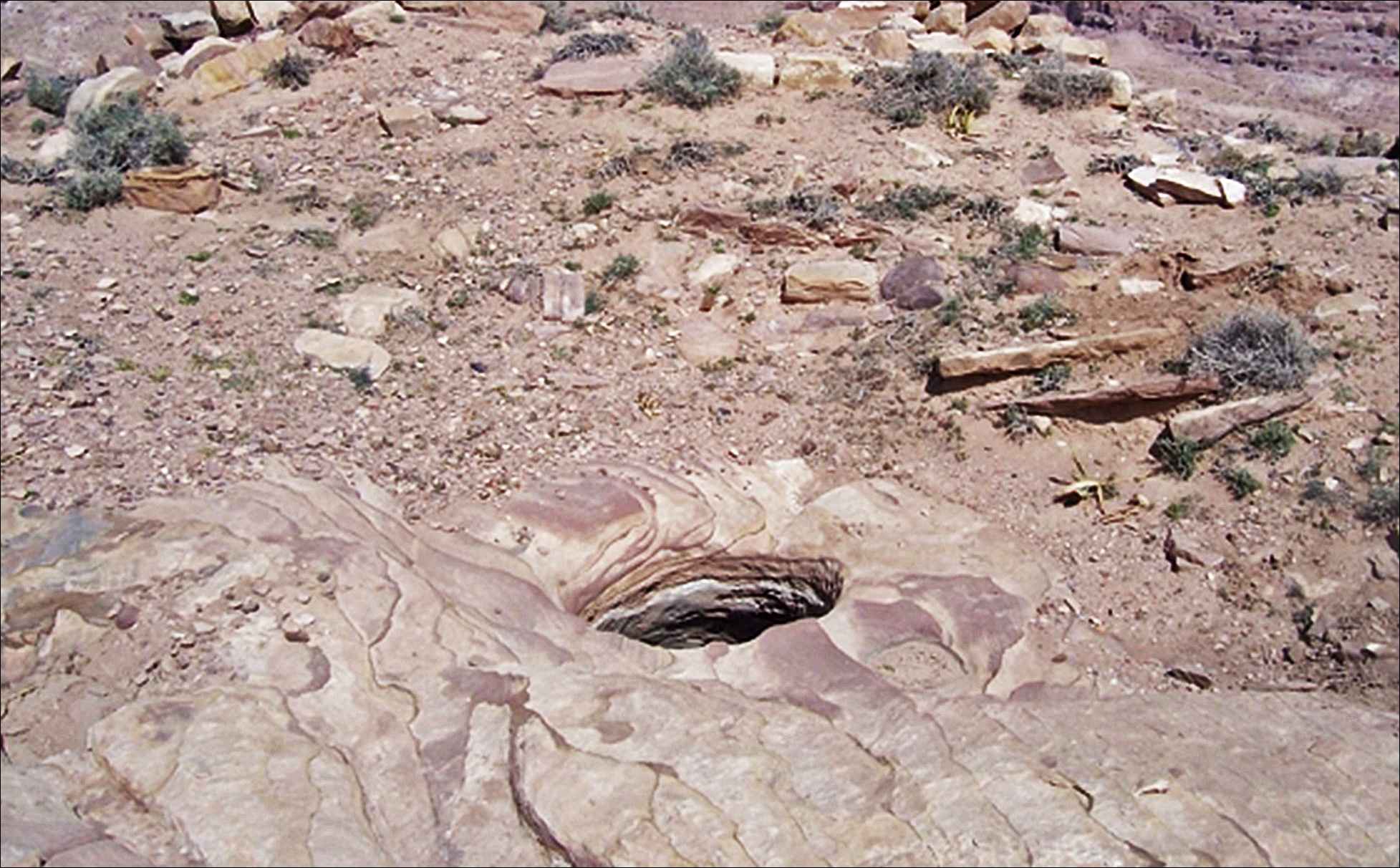 Une des premières citernes nabatéennes dans le désert près de Pétra.